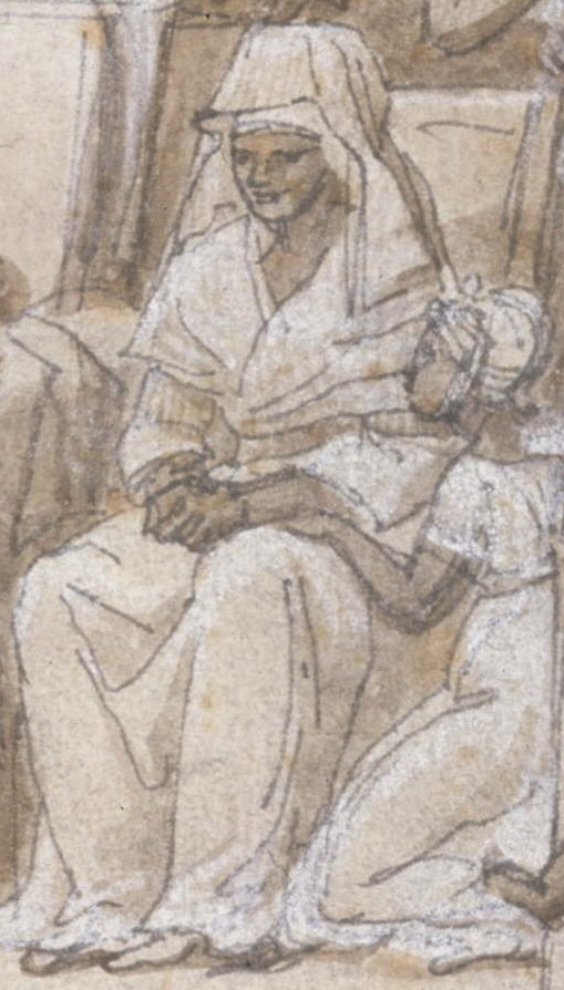 Portrait de La citoyenne Andotte (Jeanne Odo) extrait de Charles Thévenin.- L’abolition de l’esclavage proclamée par la Convention le 16 pluviôse an II-4 février 1794. Extrait de L'insurrection des esclaves entre dans la Convention. Jeanne Odo à la tribune.